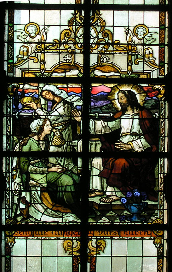 Trittenheim an der Mosel, Bleiglasfenster im Nazarenerstil (1923) in der katholischen Pfarrkirche "St. Clemens" Matthäus 5,6 Selig, die hungern und dürsten nach der Gerechtigkeit; denn sie werden satt werden. Aus den Jahren 1920/21 stammen die größtenteils noch originalen neoromanisch gehaltenen Glasfenster der Firmen Gassen & Blaschke (Düsseldorf; 1., 2., 4. und 6. Seligpreisung).